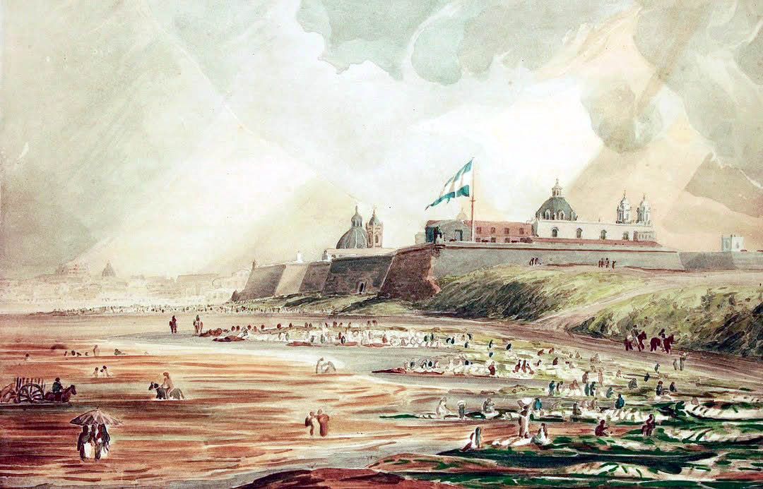 "The castle at Buenos Aires, and the beach baneath", por Emeric Essex Vidal, 1816 Fuerte de Buenos Aires, visto desde la ribera Norte.